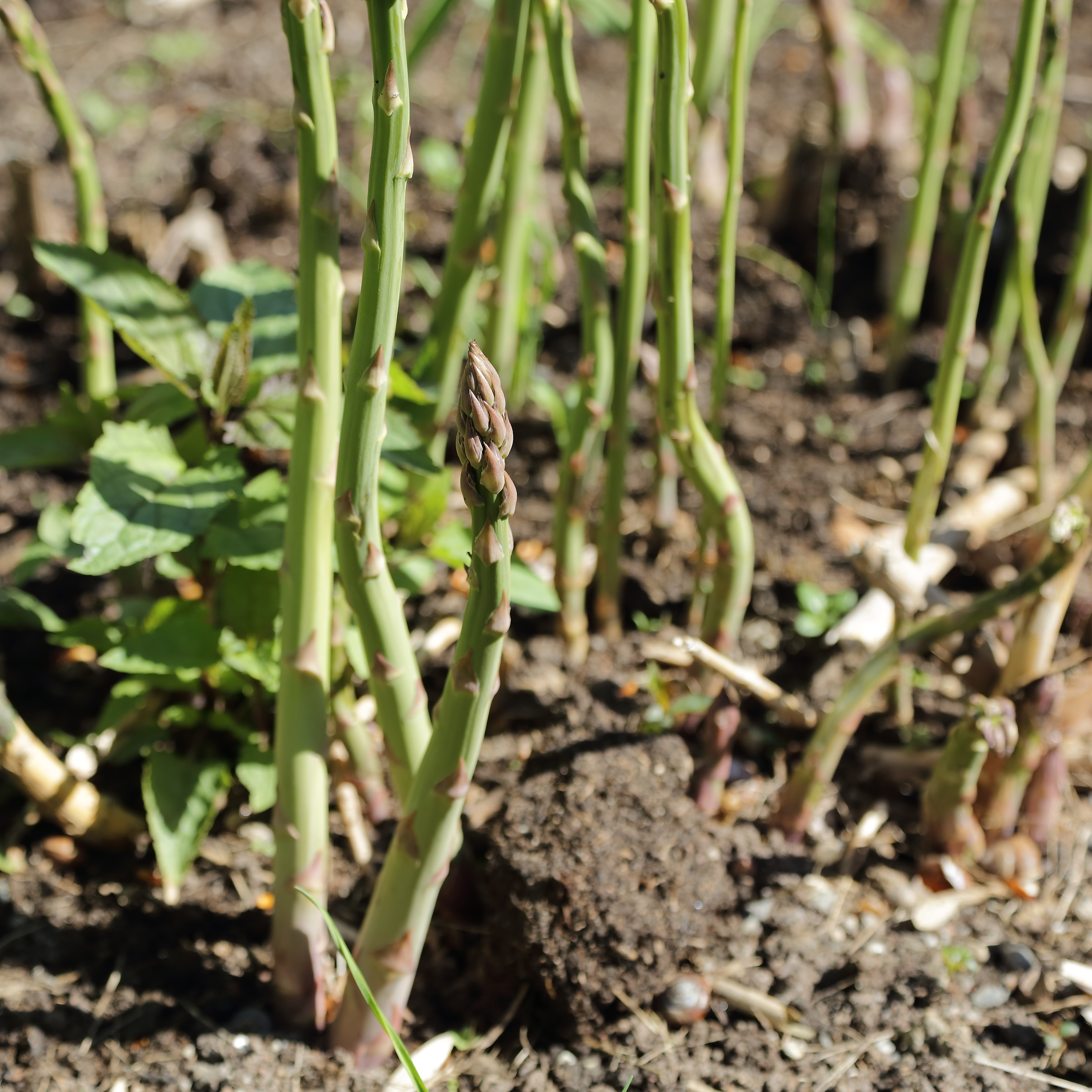 Asparagus officinalis identifierad med hjälp av skylt i Västerås botaniska trädgård.